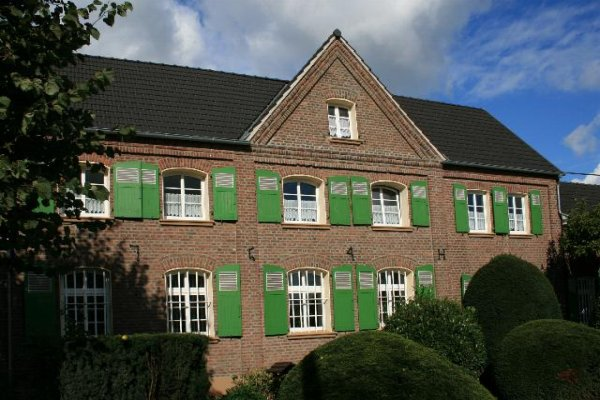 Denkmal Nr. 92 in Willich